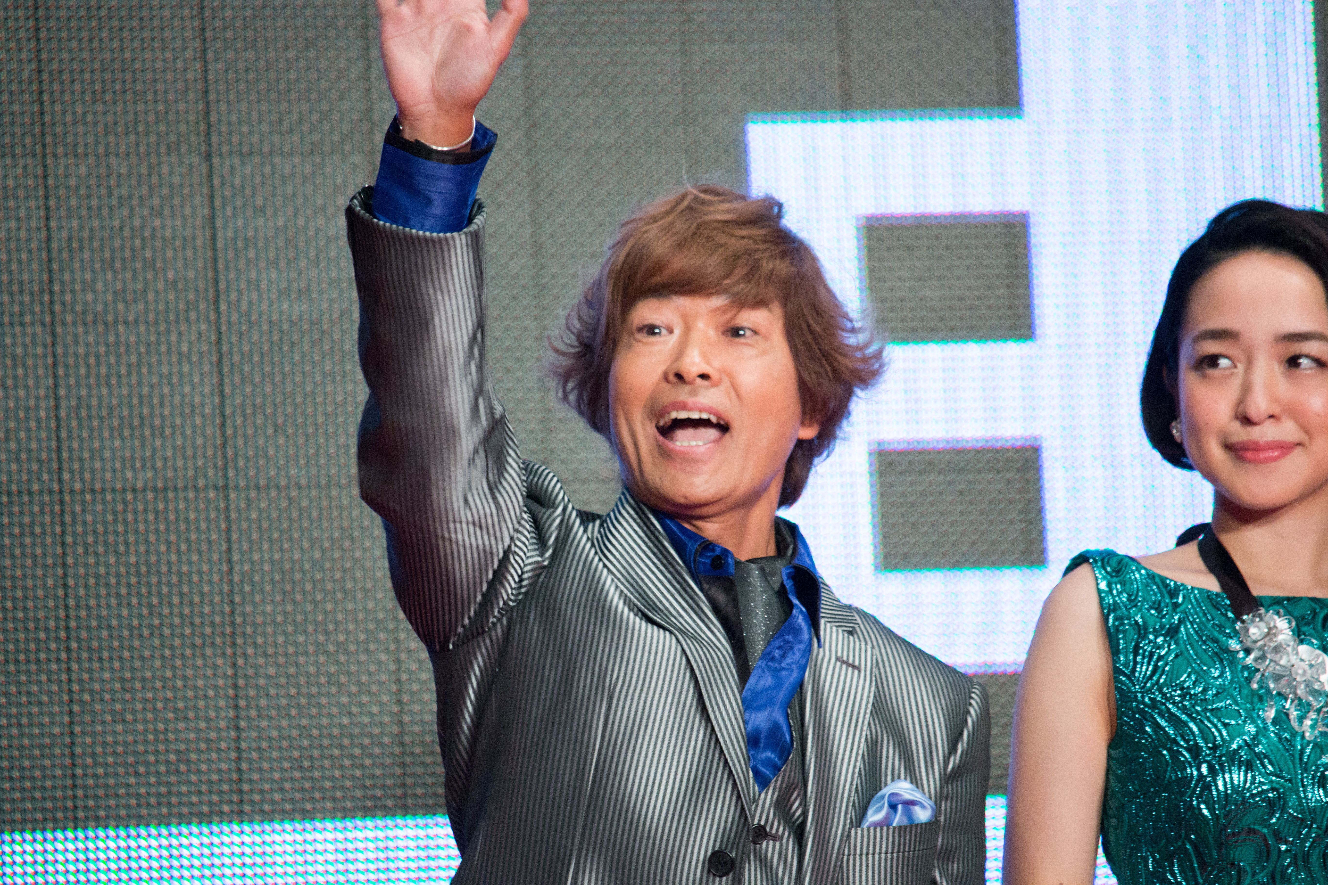 第28回 東京国際映画祭 オープニングセレモニー 古谷徹 (ガンダムとその世界)